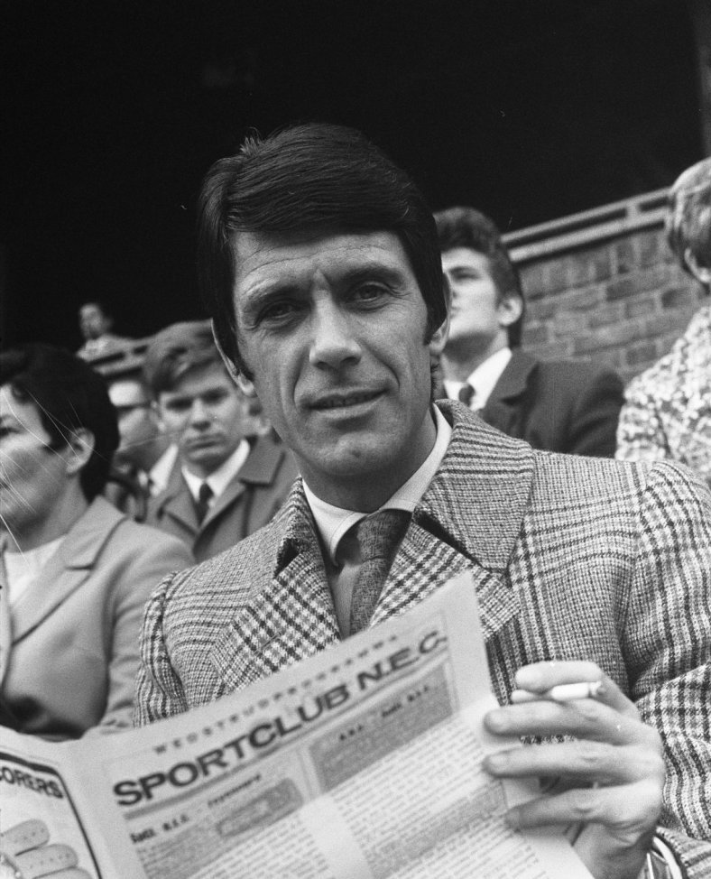 Cesare Maldini op de tribune bij N.E.C.